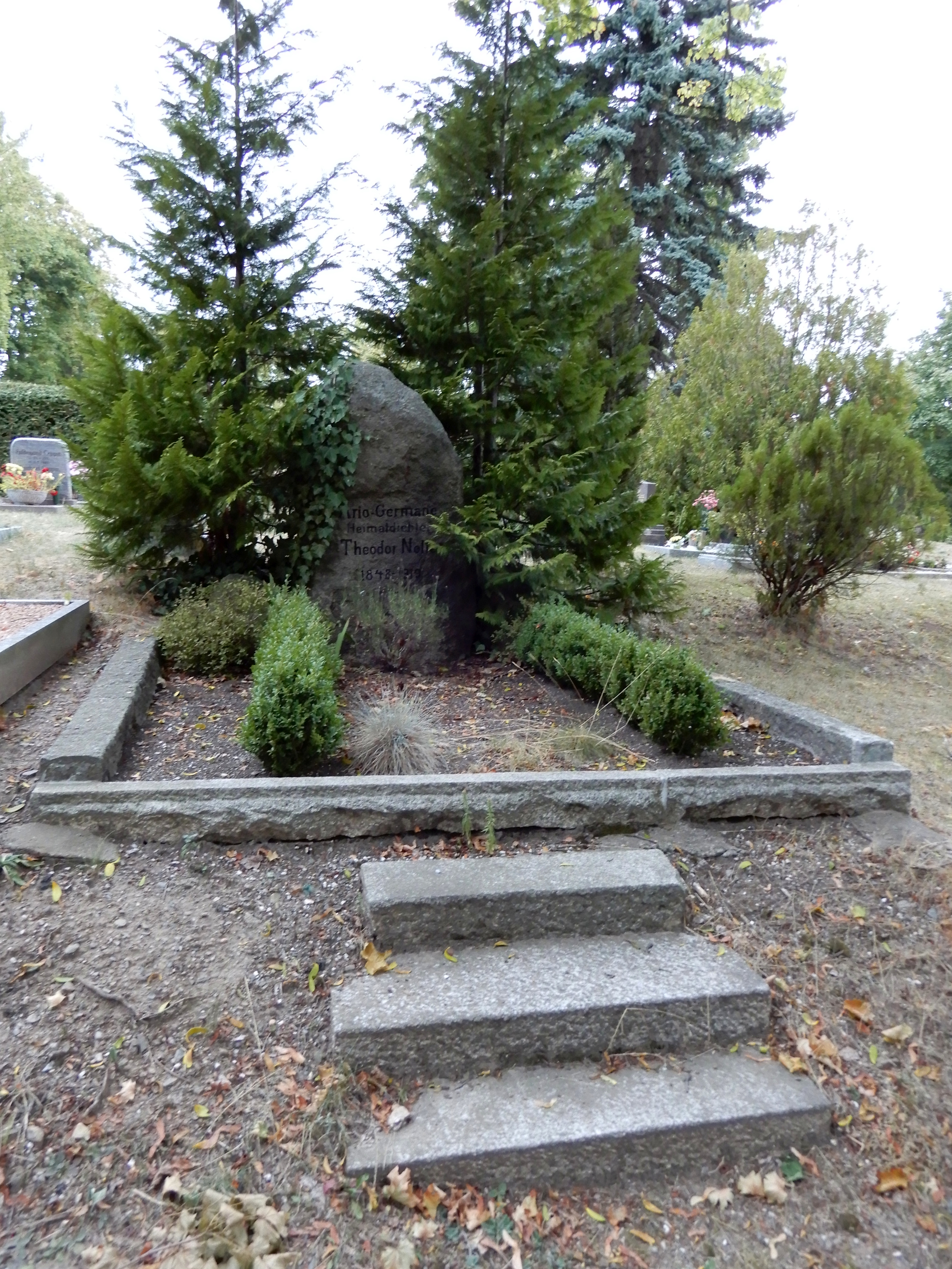 Grabmal auf dem Friedhof Thale